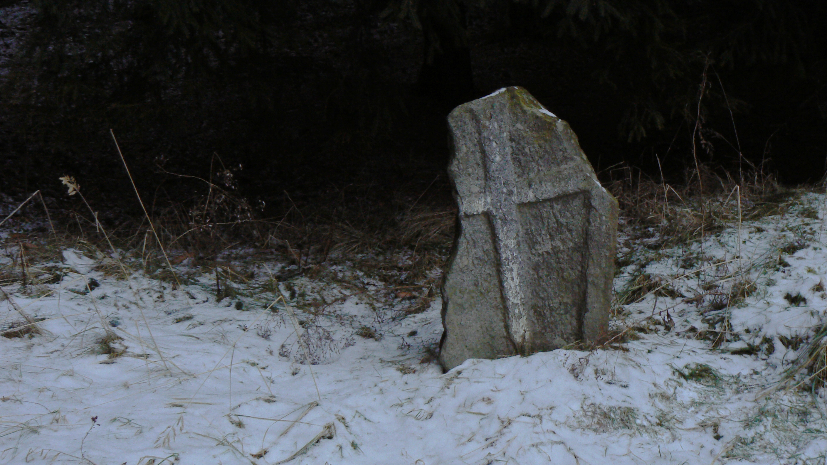 Smírčí kámen Babí kříž (Jestřebí), na pokraji lesa, Jestřebí